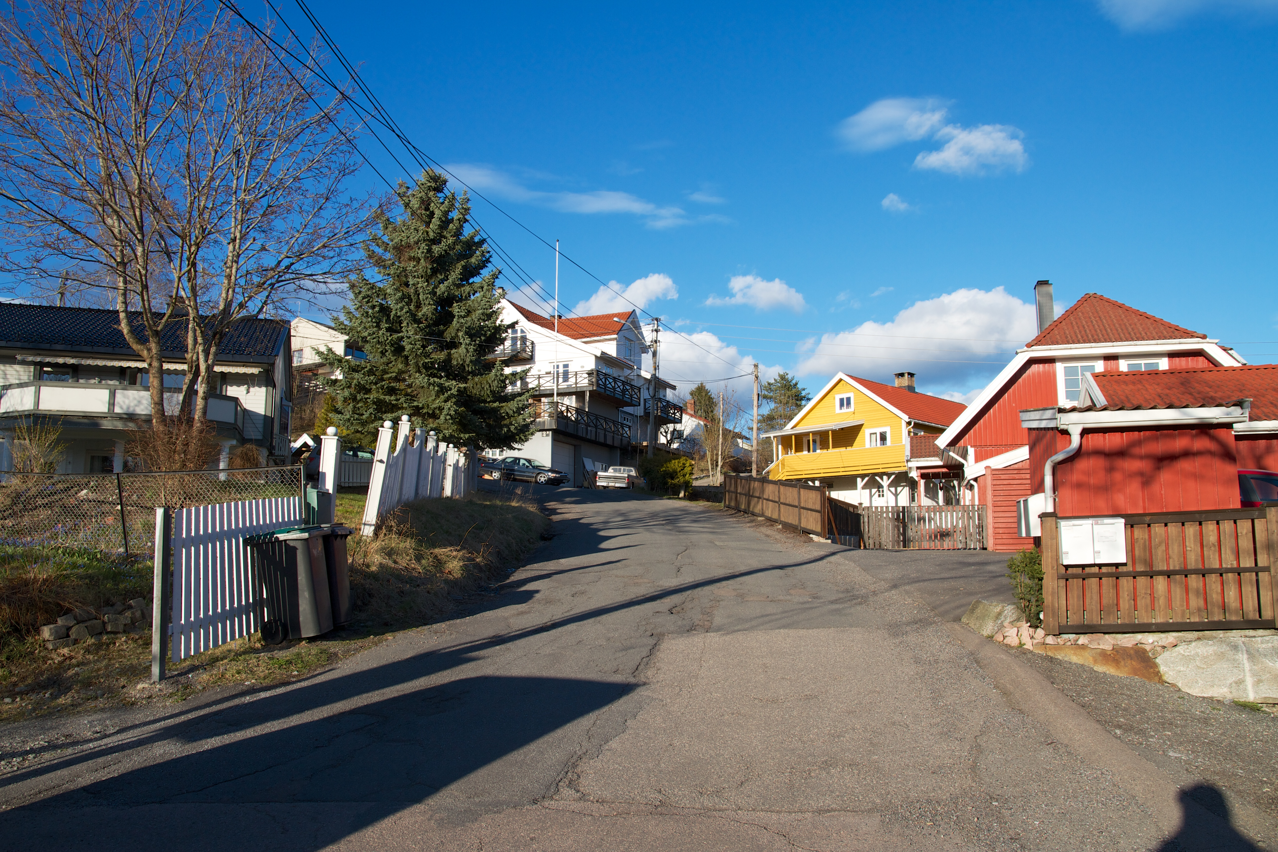 Oppsalveien på Oppsal i Oslo.